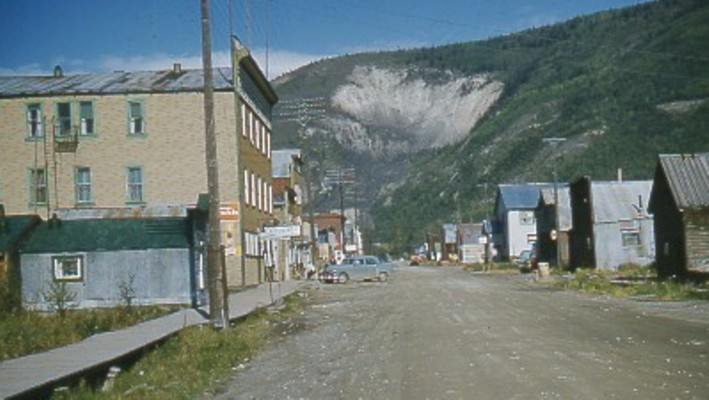 Taken in 1957